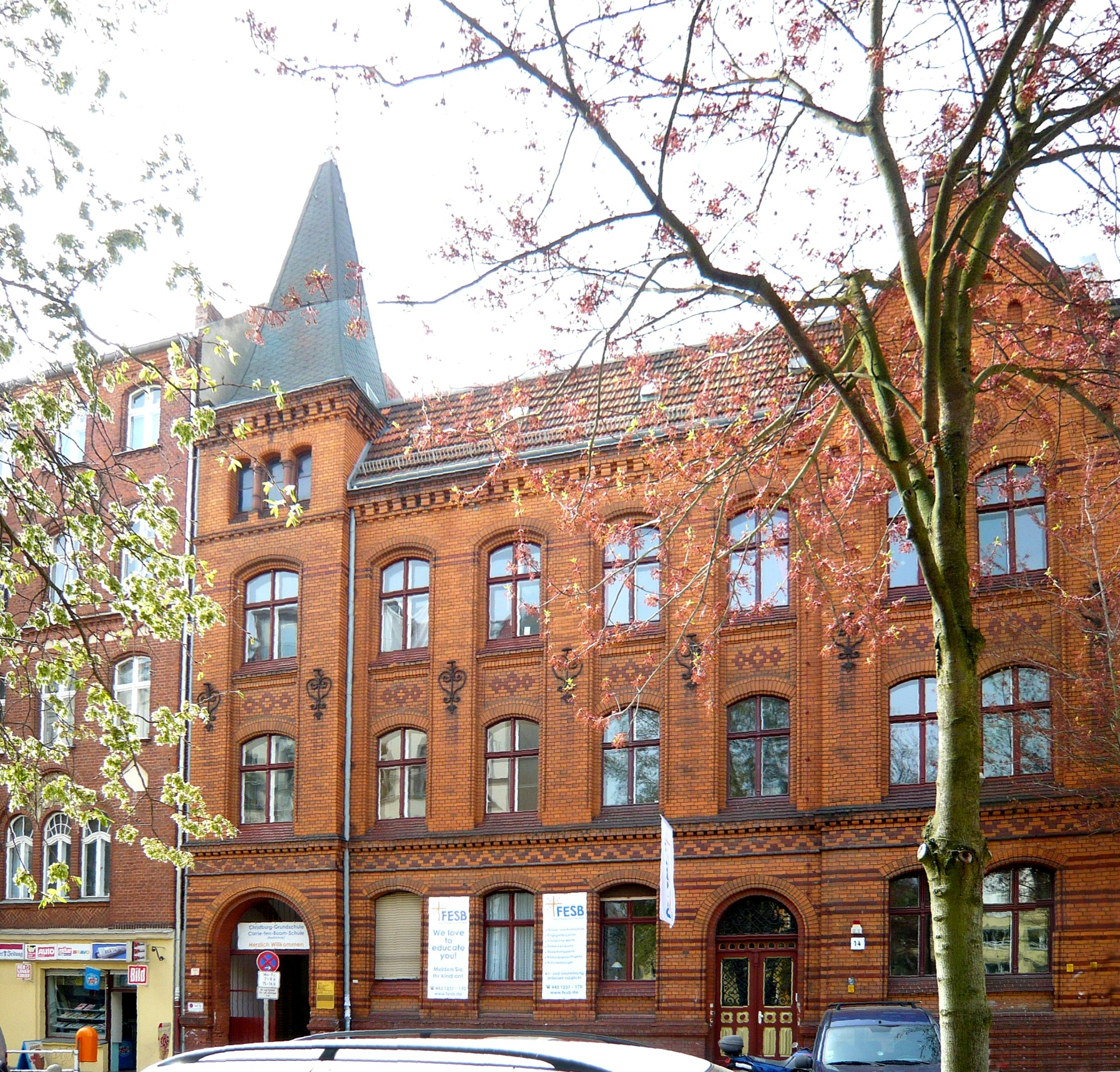 Ortsteil Prenzlauer Berg: Baudenkmal Schule Christburger 14